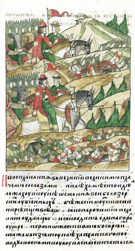 Лицевой летописный свод И восплакал князь великий великим плачем со слезами, и приехал на место, где лежали вместе восемь князей белозерских убитых. Были же сии мужественны и крепки очень, и известные и славные удальцы; и один за другого умерли, и со множеством бояр их. Также близко от тех подъехал к великому воеводе своему Микуле Васильевичу, тысяцкому, [и (тут) 15 князей с ним, и многое множество бояр, и воевод мертвых лежало.]